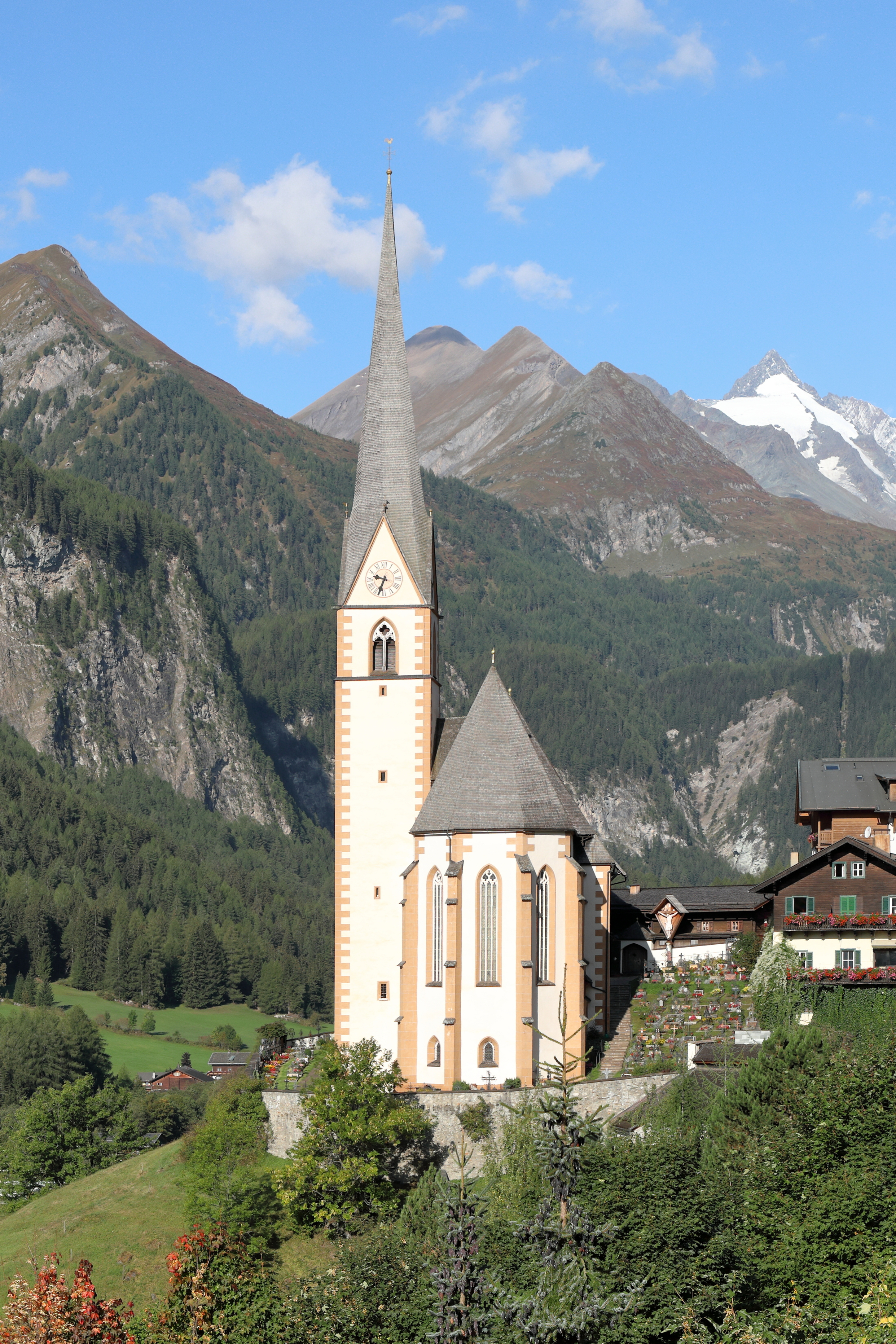 Ostsüdostansicht der im 15. Jahrhundert errichteten röm.-kath. Pfarrkirche heilige Vinzenz in der österreichischen Gemeinde Heiligenblut am Großglockner in Kärnten mit dem Großglockner im Hintergrund.